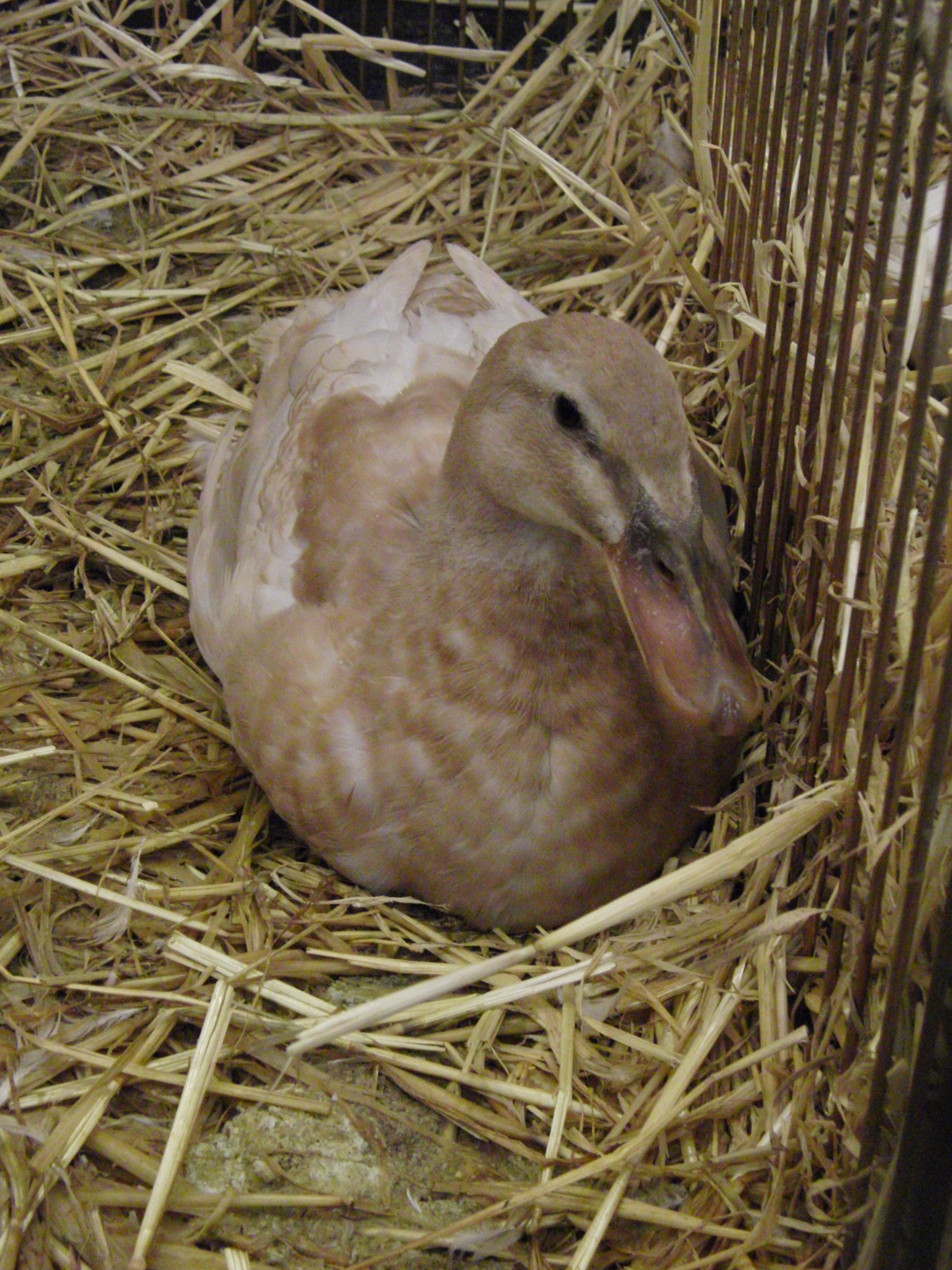 Canard Coureur indien - Salon international de l'agriculture 2013, Paris, France